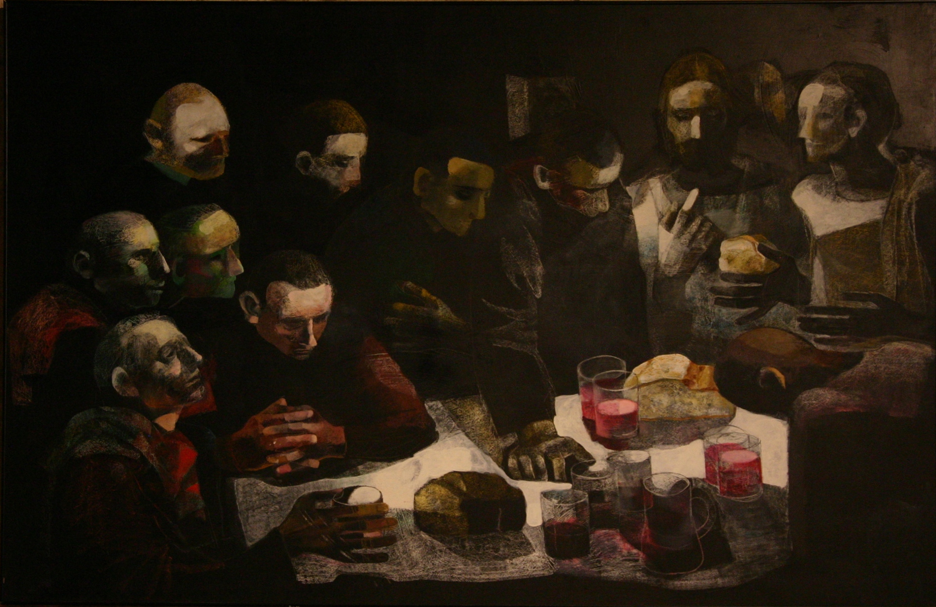 Interior da Catedral